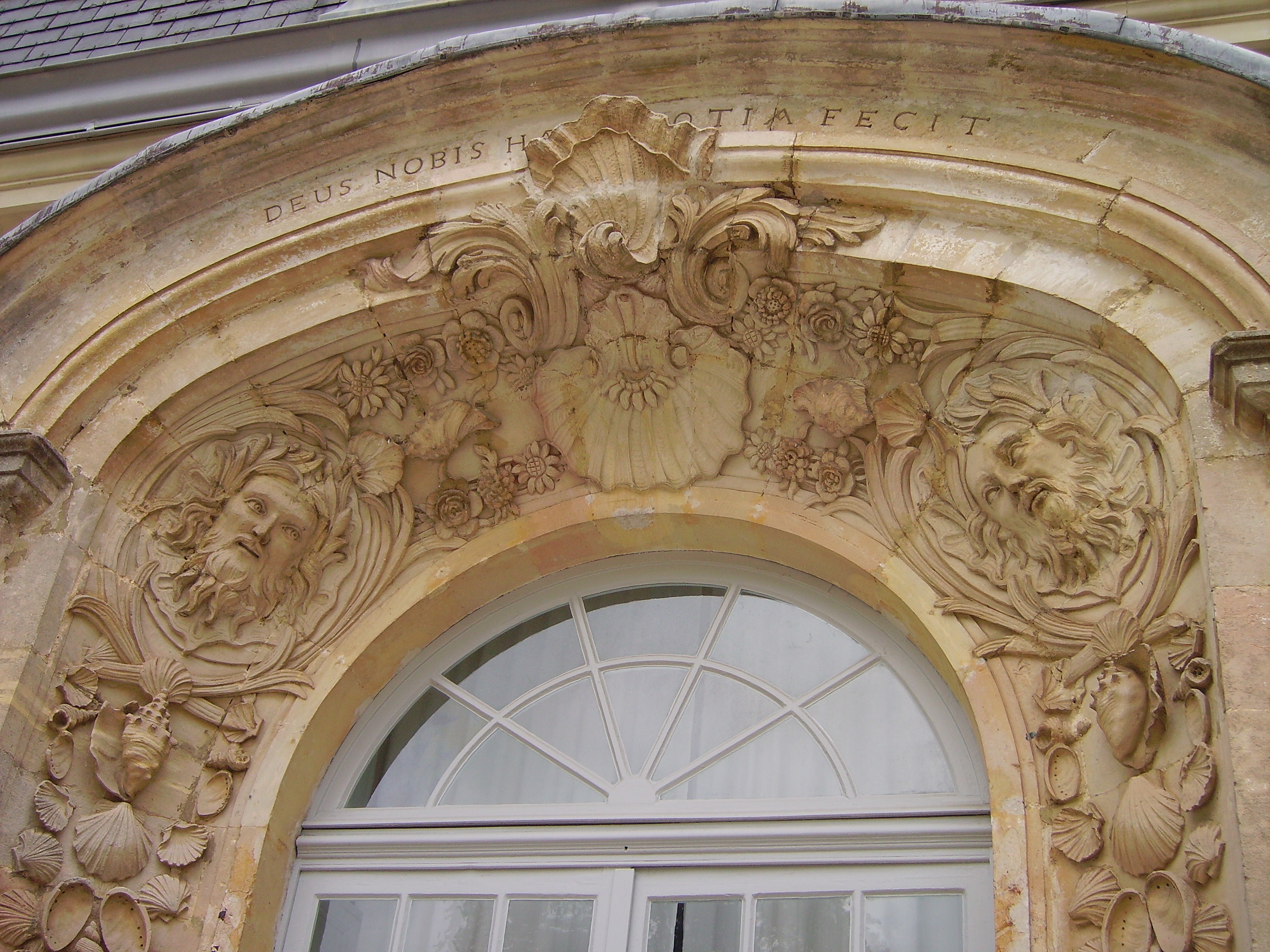 Détail des sculptures autour d'une fenêtre This building is en partie classé, en partie inscrit au titre des Monuments Historiques. . Deus nobis haec otia fecit. God have given as the Muse. Gott hat und die Muse geschenkt: Vergil Eclogae